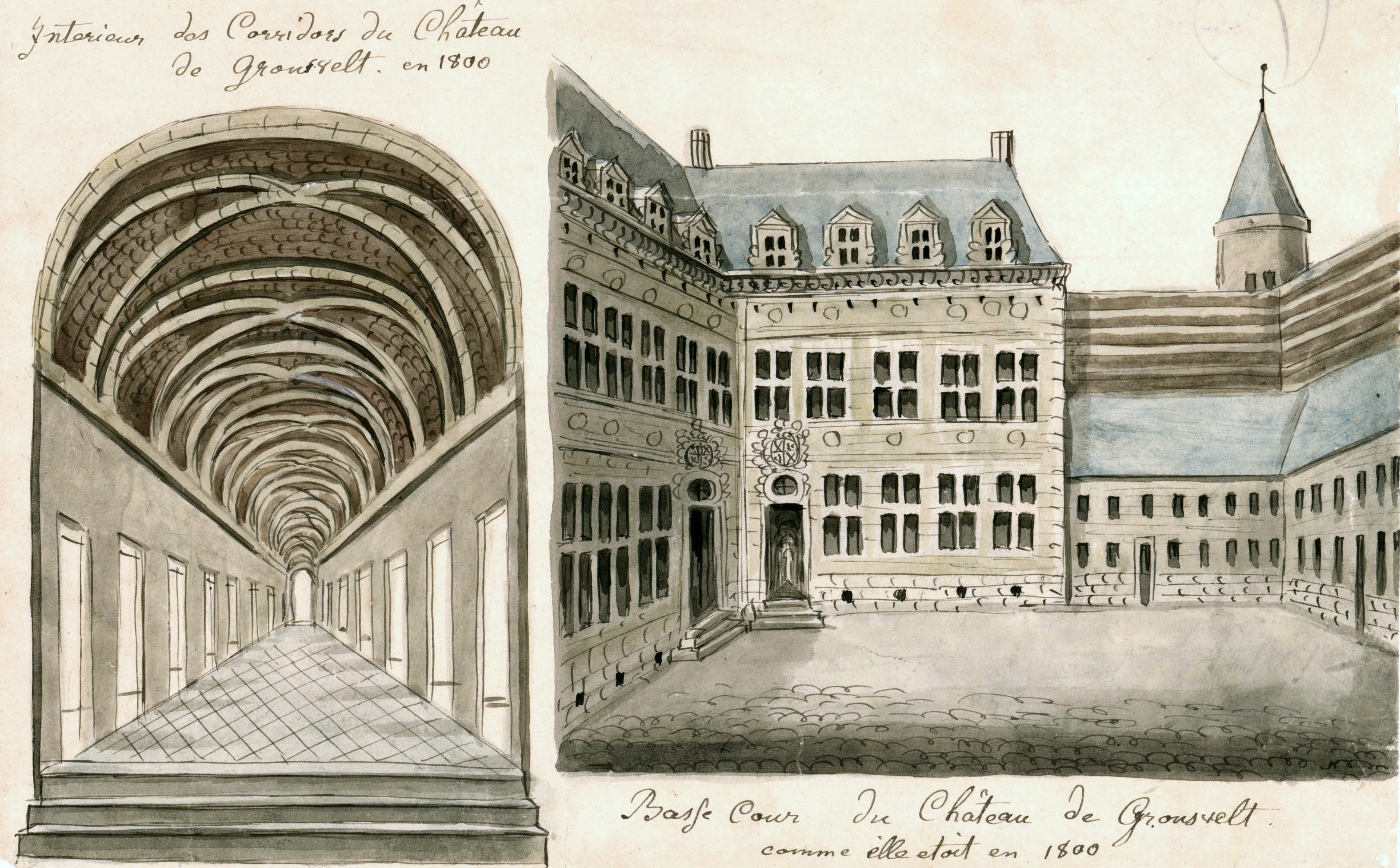 Ingekleurde tekening van Philippe van Gulpen van Kasteel Gronsveld bij Maastricht. De tekening geeft een reconstructie van de situatie in 1800. Bijschrift: Interieur des corridors du château de Gronsvelt en 1800 en Basse cour du Château de Gronsvelt comme elle etait en 1800. Collectie Van der Noordaa in het RHCL, Maastricht, CVDN 278.